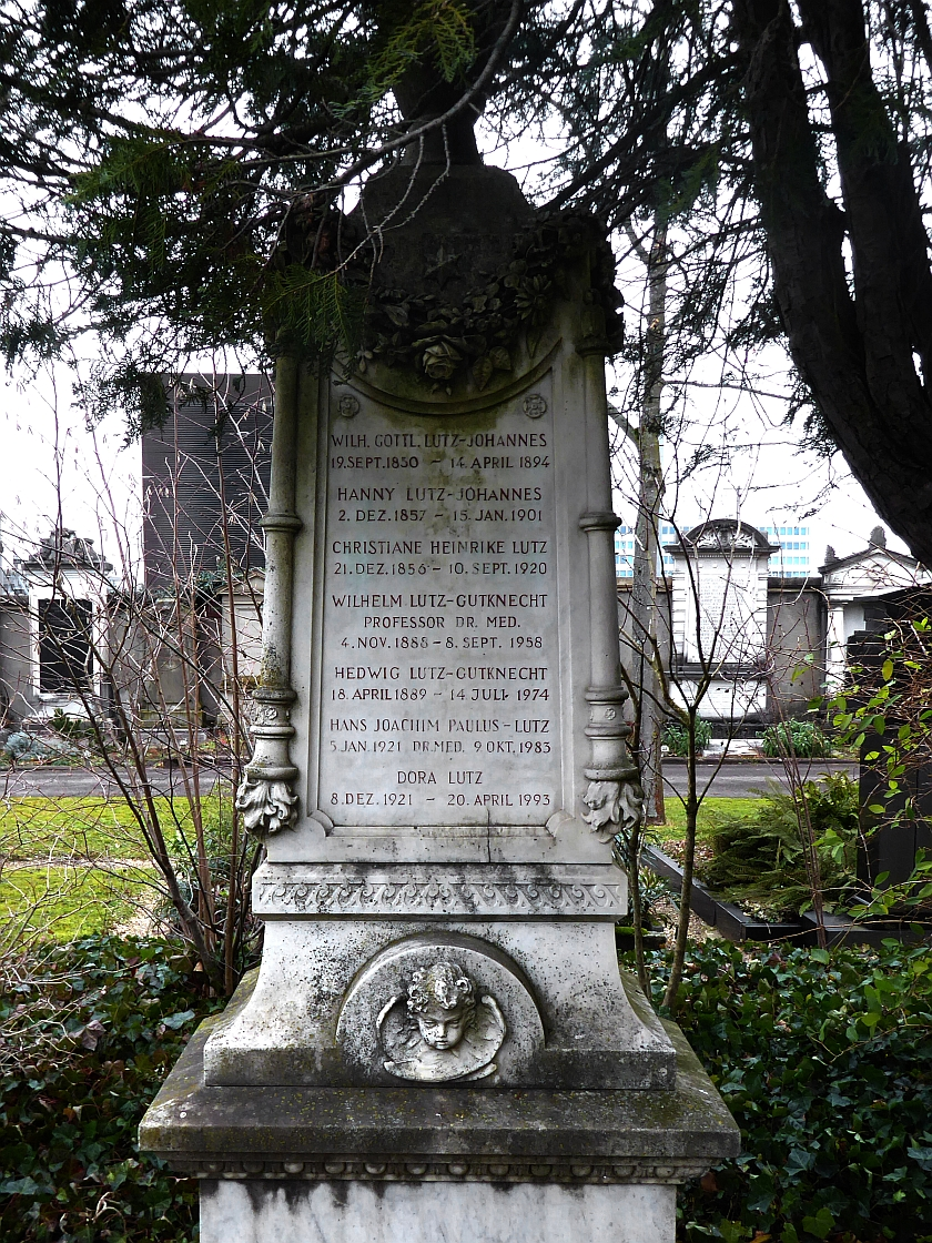 Wilhelm Lutz-Gutknecht (1888–1958) Dr.med., Professor der Dermatologie, Grab auf dem Friedhof Wolfgottesacker, Basel